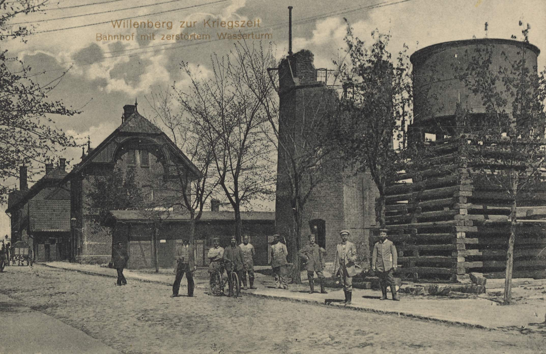 Bahnhof mit zerstörtem Wasserturm